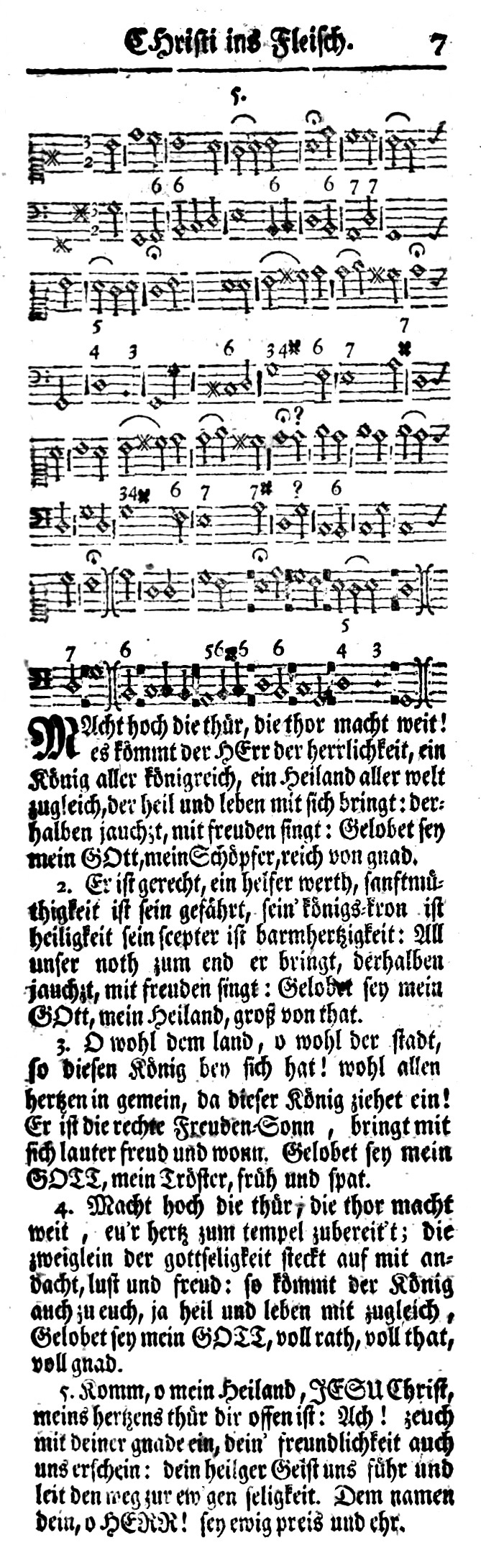 Macht hoch die Tür im Freylinghausenschen Gesangbuch 1734: Text und Melodie mit beziffertem Bass